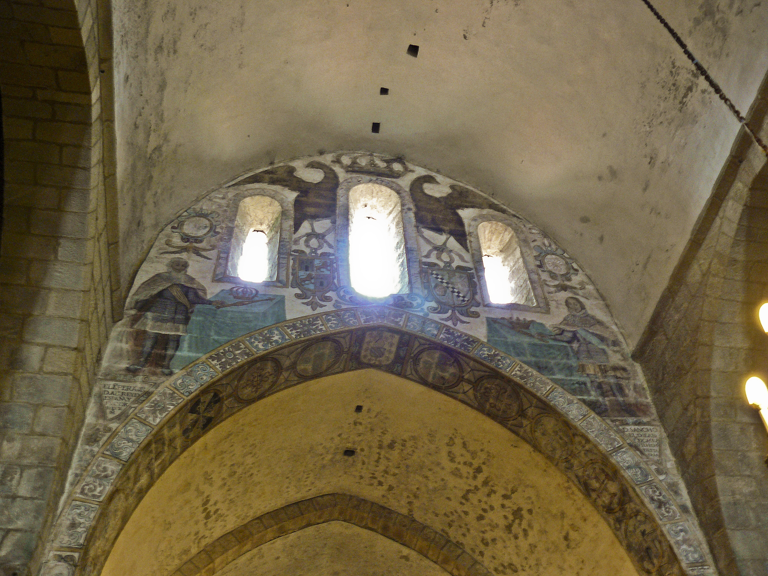 Pinturas da igrexa do Mosteiro de Santa María de Oia